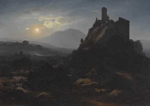 Olevano im Mondschein. Signiert und datiert 1860. Öl auf Leinwand, 96 x 133 cm